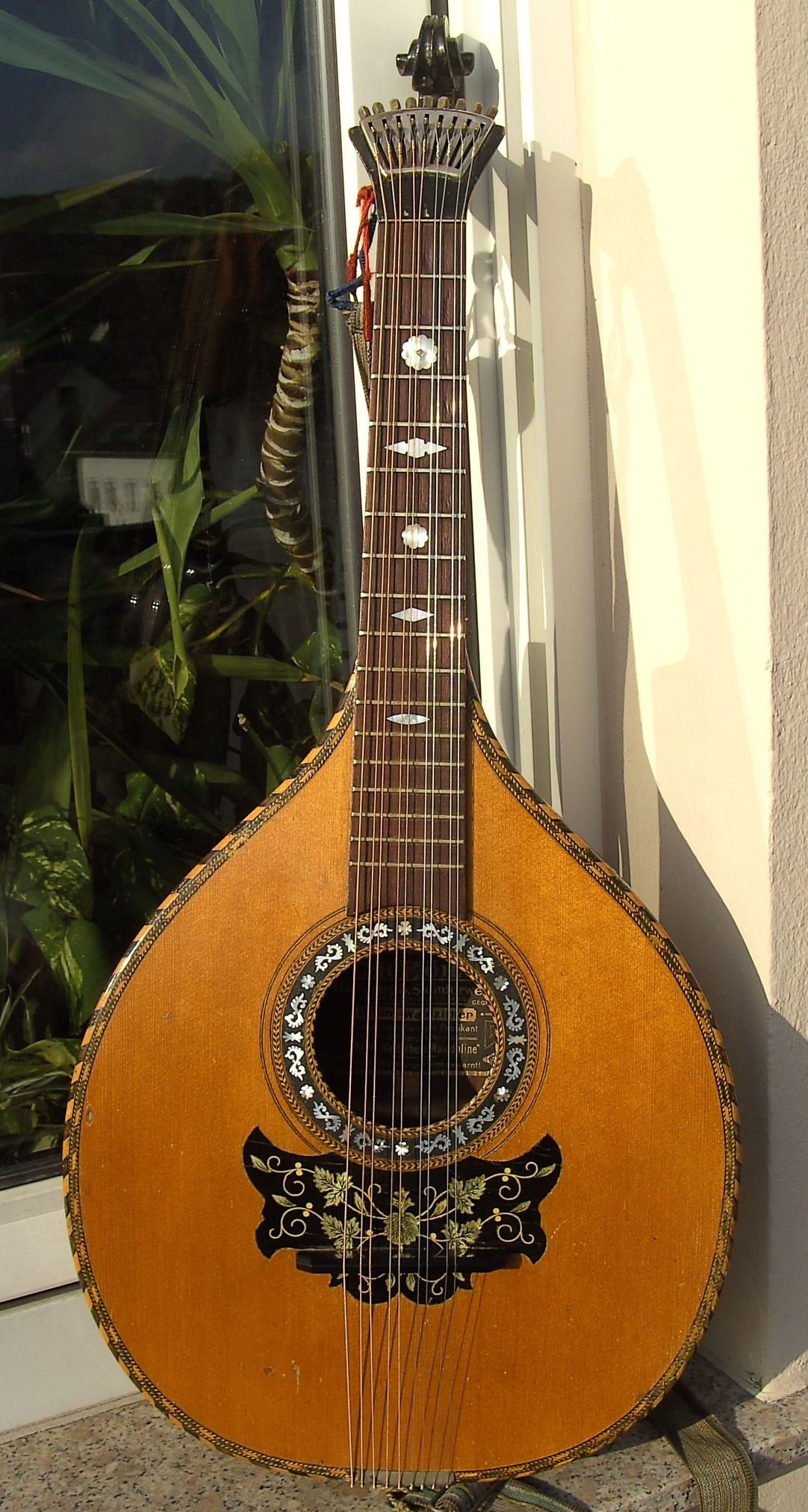 Böhm-Waldzither Nr. 3 ca. 1925-1937